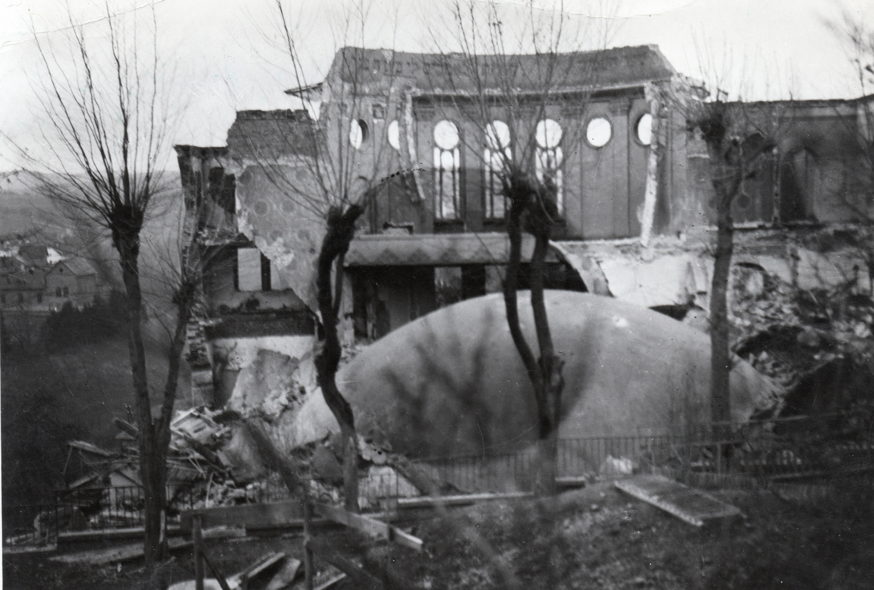 Die Bad Wildunger Synagoge nach mehreren Sprengversuchen seit dem 19.11.1938. Die Südmauer stürzte am 1.12.1938, abends gegen 18 Uhr ein.